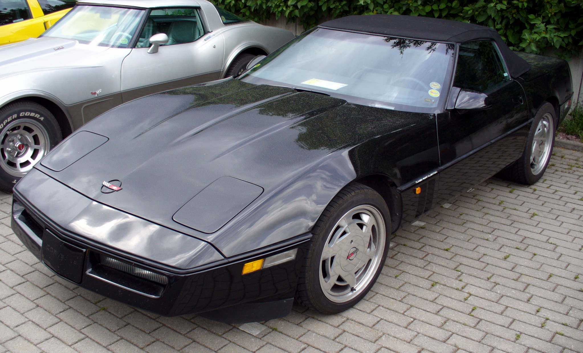 Chevrolet Corvette C4 Convertible